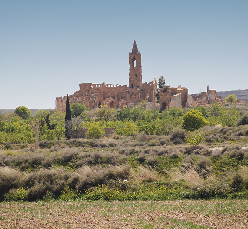 Vista del pueblo de Belchite, en la provincia de Zaragoza, Aragón, España